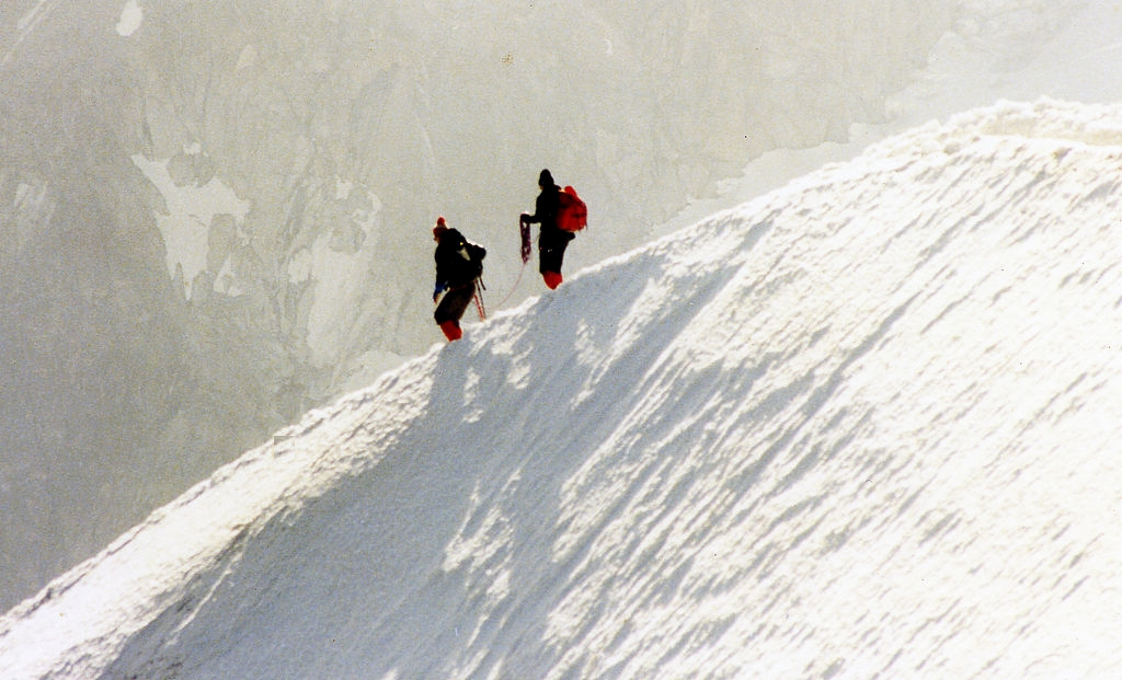 Aiguilles du Midi, Chamonix